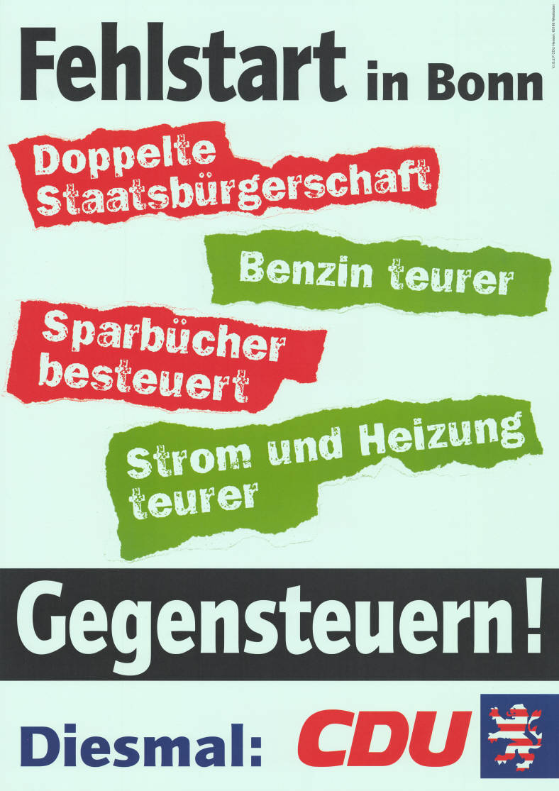 Fehlstart in Bonn Doppelte Staatsbürgerschaft Benzin teurer Sparbücher besteuert Strom und Heizung teurer Gegensteuern! Diesmal: CDU Abbildung: Hessischer Löwe Plakatart: Textplakat Allgemein Auftraggeber: V.i.S.d.P.: CDU Hessen, Wiesbaden Objekt-Signatur: 10-007 : 1305 Bestand: Landtagswahlplakate Hessen (10-007) GliederungBestand10-18: Landtagswahlplakate Hessen (10-007) » CDU Lizenz: KAS/ACDP 10-007 : 1305 CC-BY-SA 3.0 DE